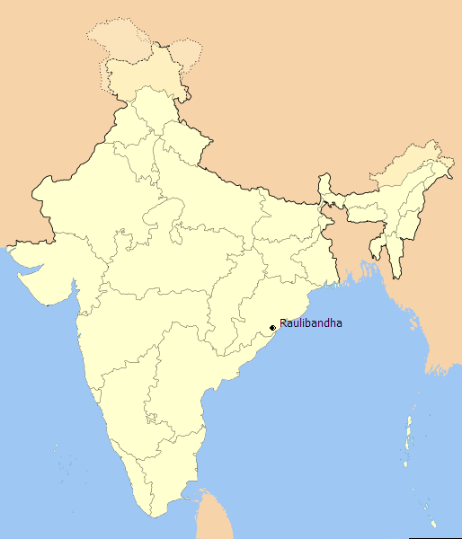 raulibandha, village in ganjam, Orissa, India